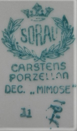 Porzellanmarke Sorau Dec. MIMOSE, Carstens Porzellan